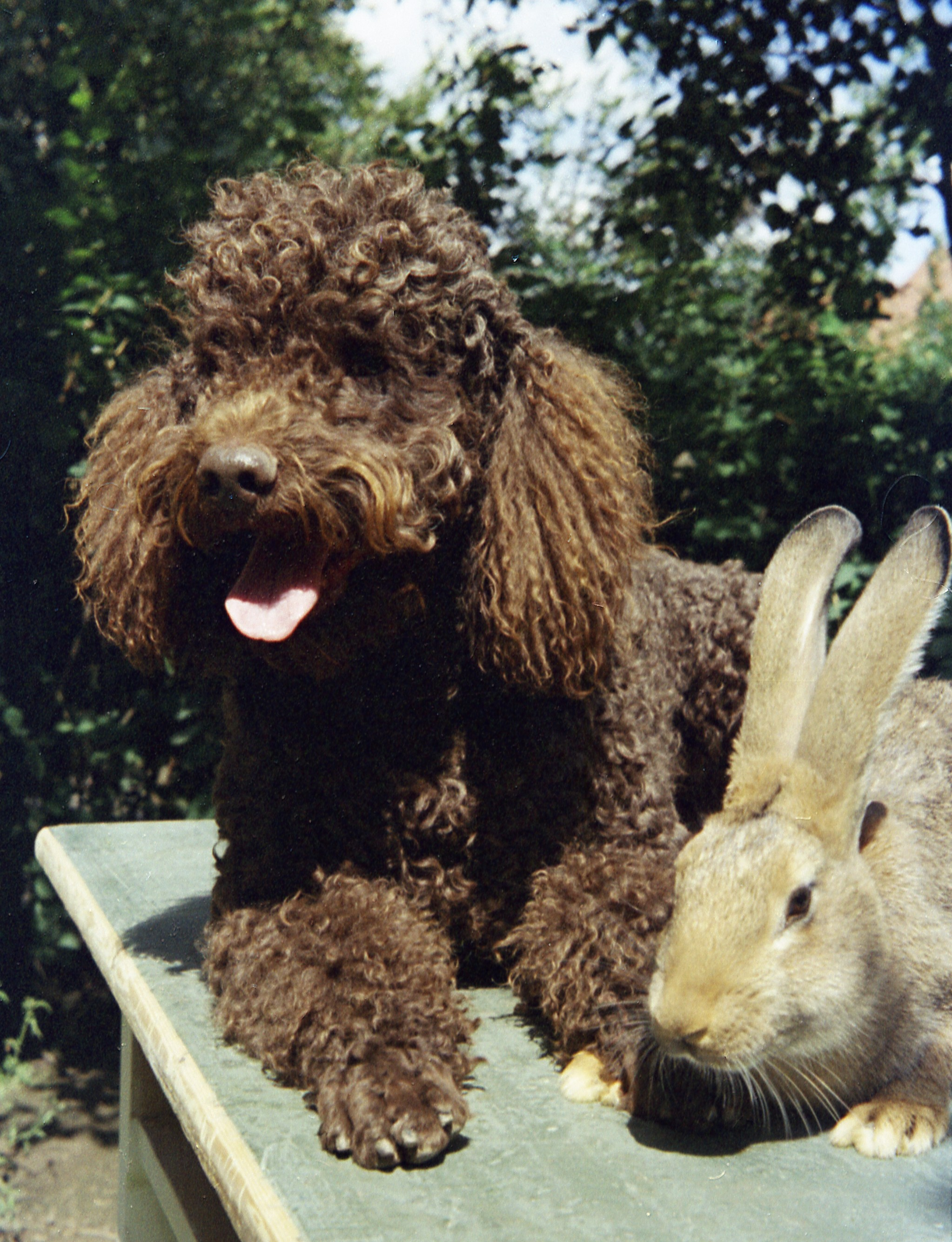 Königspudel mit Hase